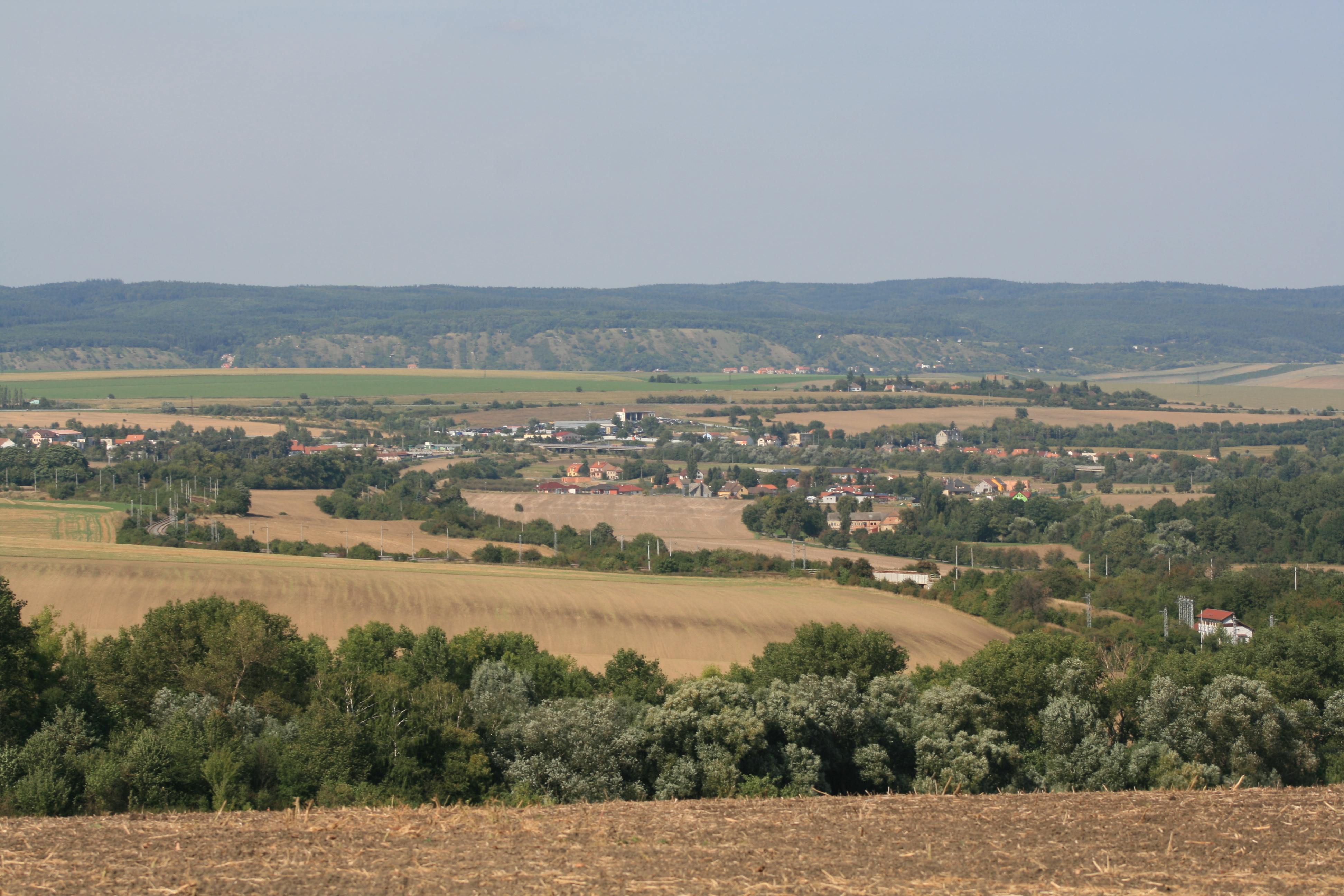 Obec Holubice, okres Vyškov. Celkový pohled od jihu z návrší Krchůvek nad Křenovicemi.